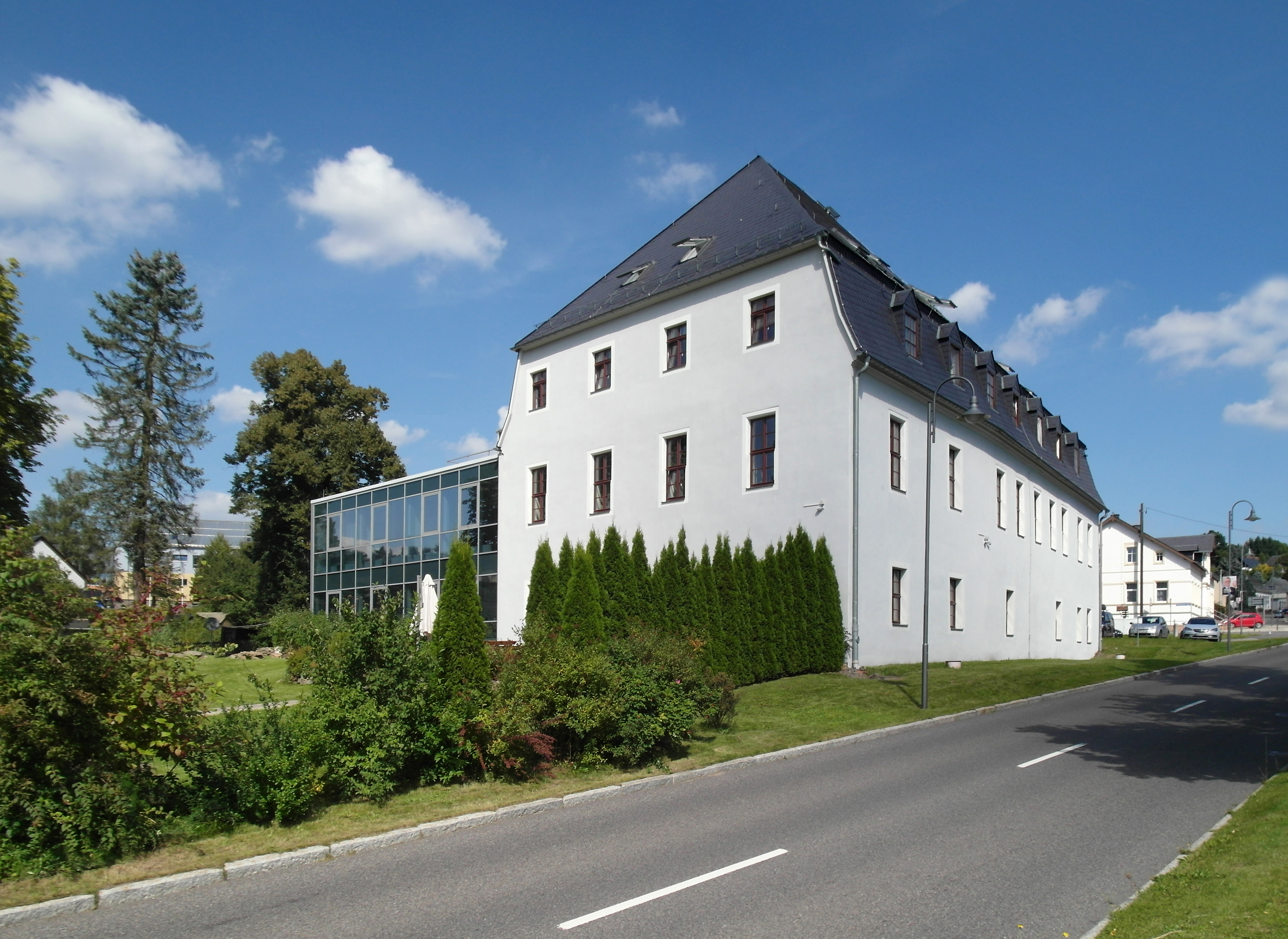 05.09.2017 09518 Rückerswalde (Großrückerswalde), Wolkensteiner Straße 1 (GMP: 50.626721,13.109620): Herrenhaus des ehemaligen Ritterguts Rückerswalde, errichtet um 1750 für den Grafen zu Solms und Tecklenburg. 2006/07 Umbau und Sanierung. Heute Rehabilitationsklinik. Sicht von Süden. [SAM1770.JPG]20170905310DR.JPG(c)Blobelt